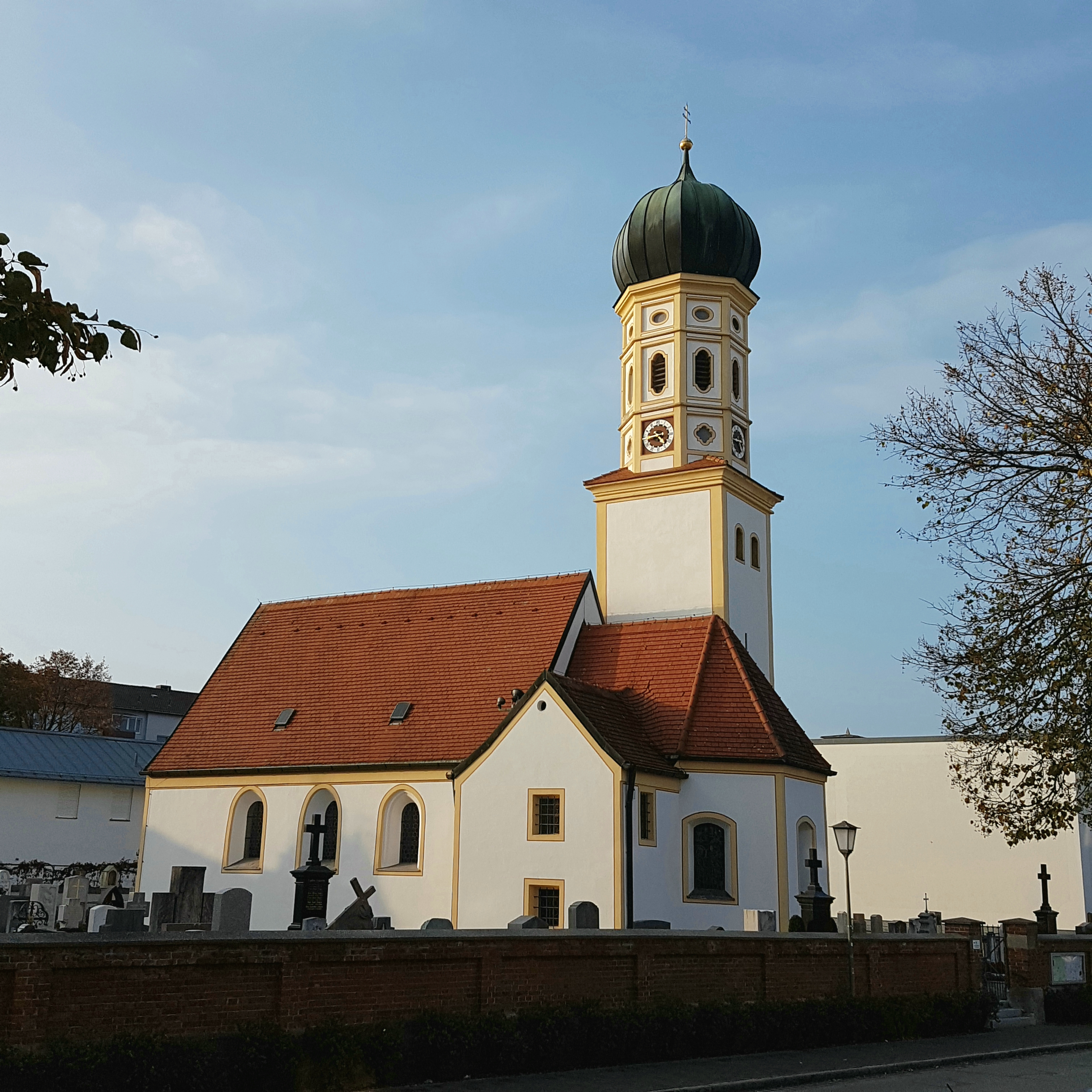 St. Peter (Hadern), Ansicht vom Südosten